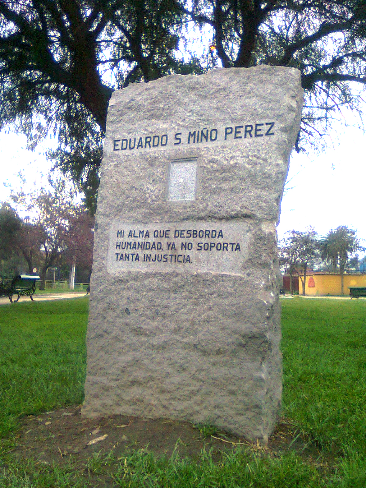 Monolito conmemorativo de Eduardo Segundo Miño Pérez, militante comunista chileno que se quemó a lo bonzo frente al Palacio de La Moneda en el 2001 como protesta por estar desempleado y por las víctimas de la asbestosis. Monumento instalado en la Plaza de Los Industriales, en Av. Camino a Melipilla con Carmen, en la comuna de Maipú. Incluye la última frase que escribió en su carta de despedida: «Mi alma que desborda humanidad ya no soporta tanta injusticia».